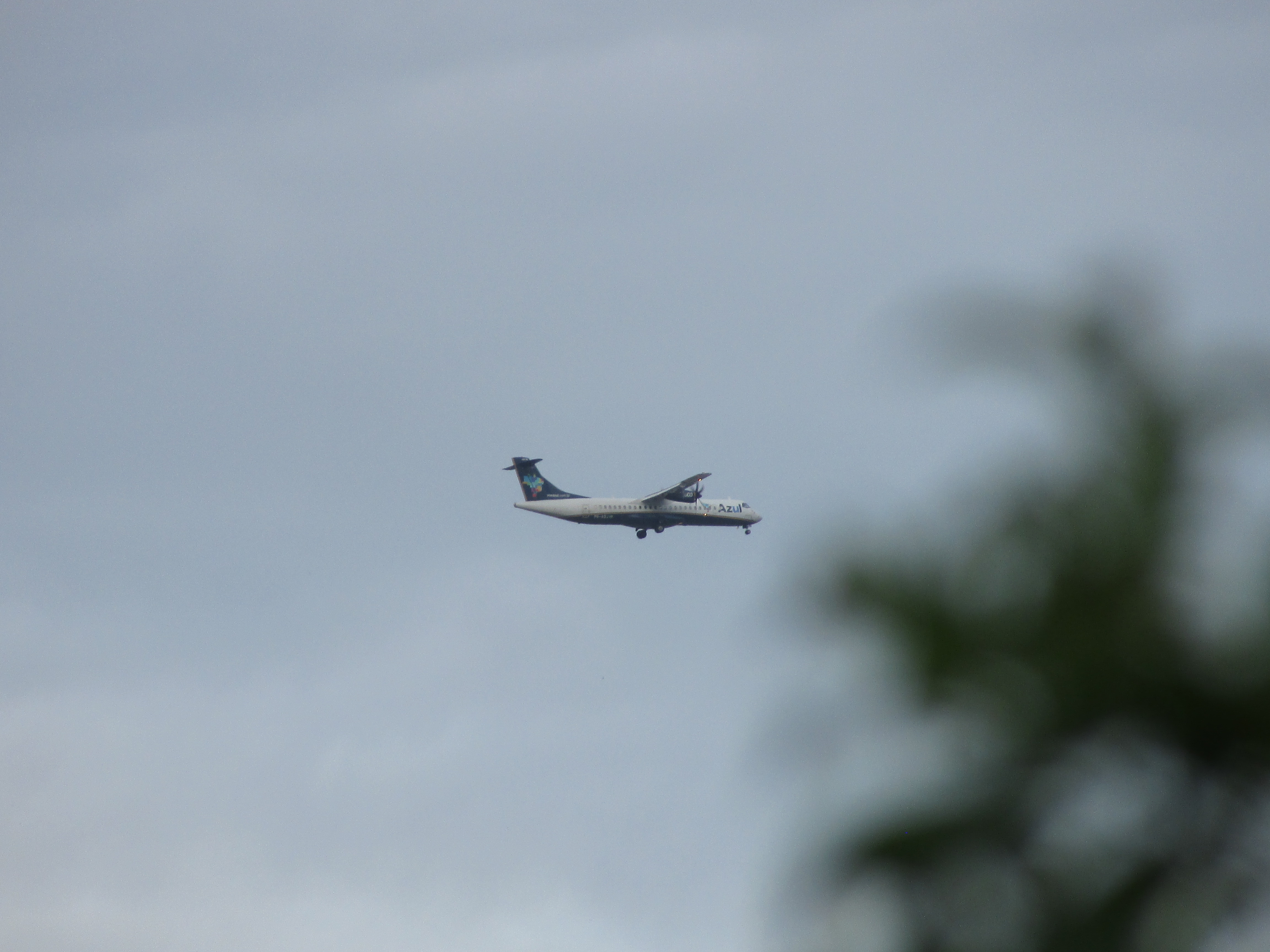 Avião da Azul sobrevoando sobre Recife